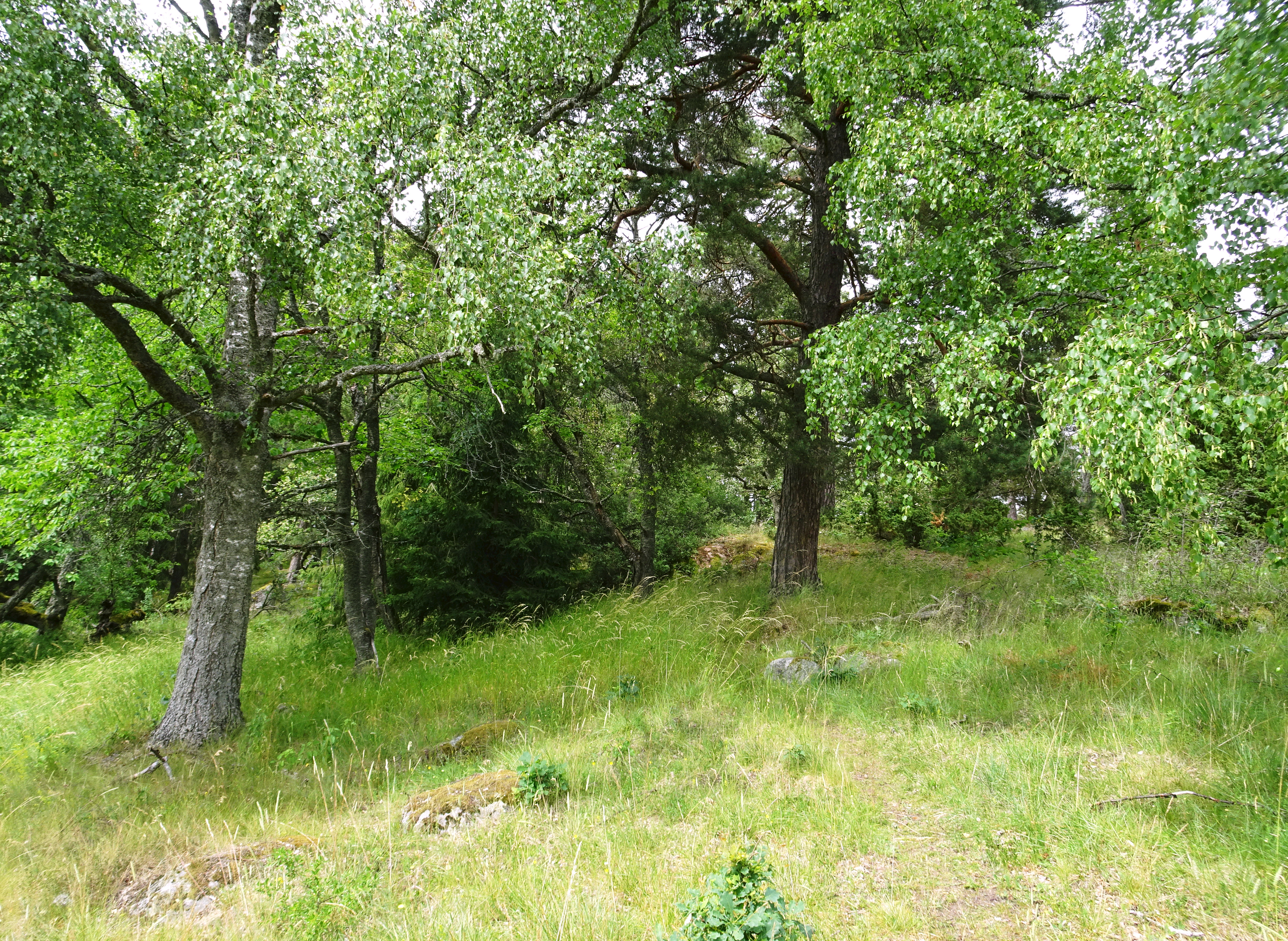 Järnåldersgravfält (RAÄ-nummer Salem 224:1) väster om Bergaholm, Salems största järnåldersgravfält.